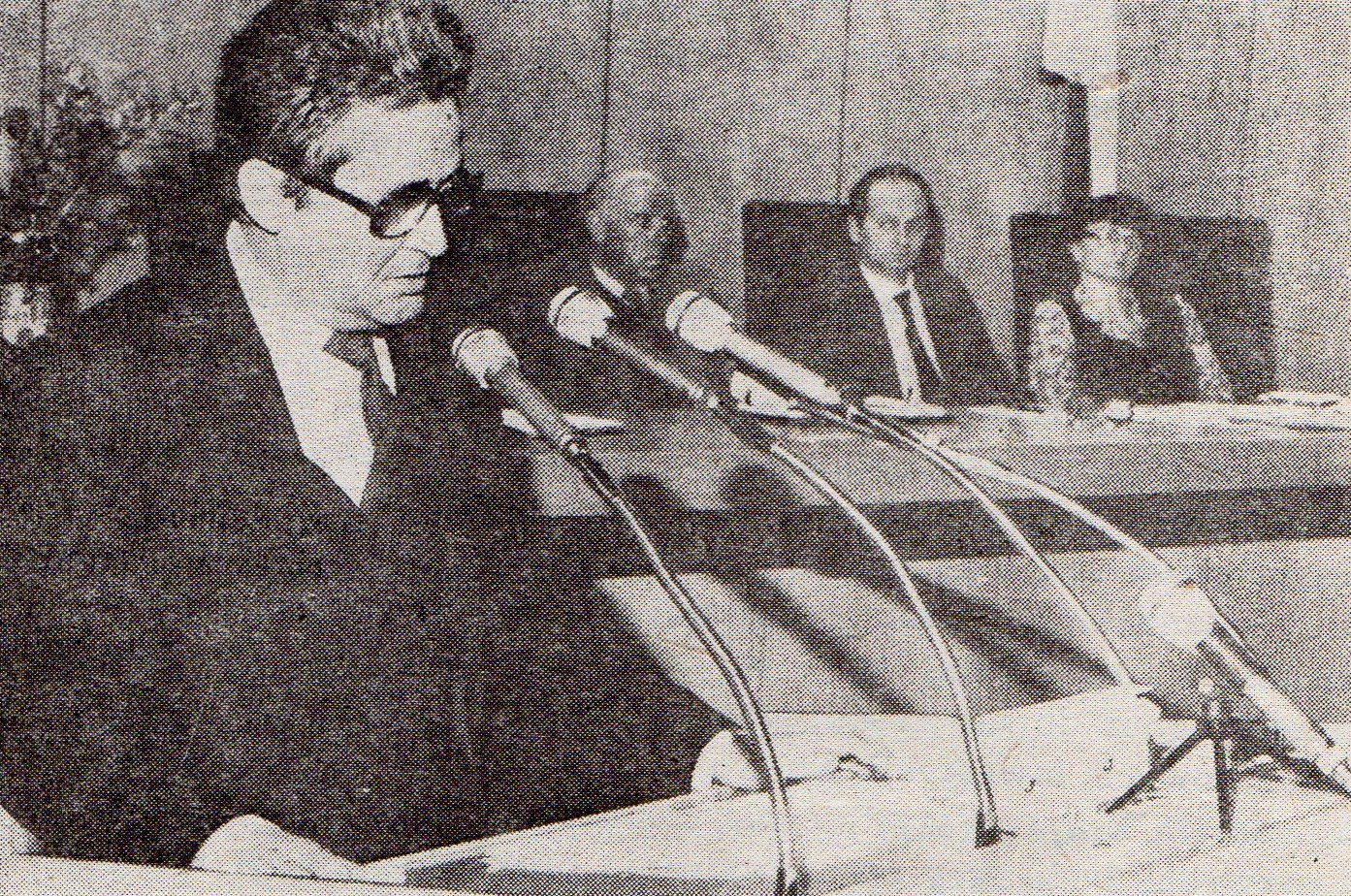 Prezydent Andrzej Wituski - absolutorium MRN w Poznaniu (1984).